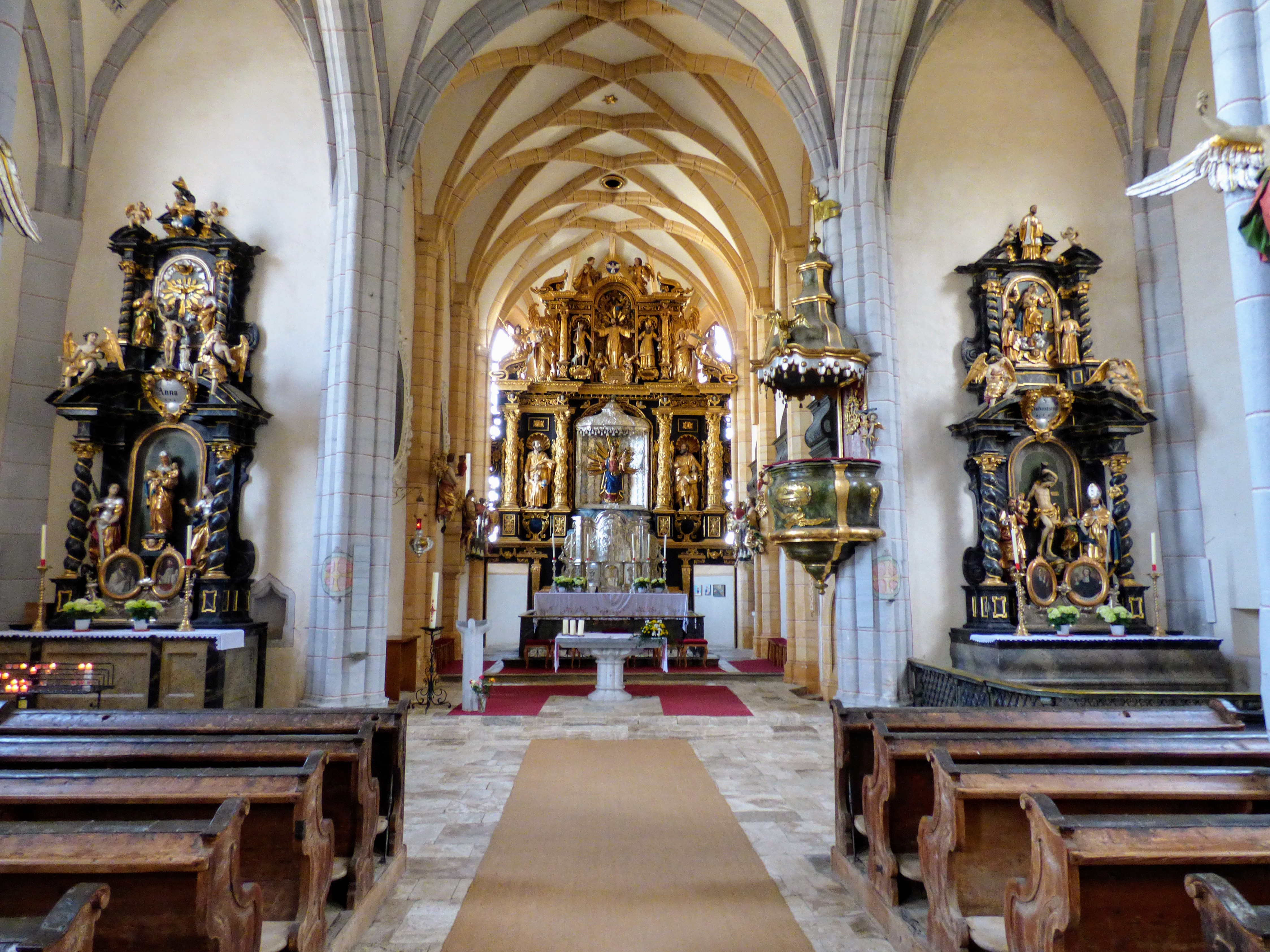 Wallfahrtskirche Maria Buch, Gemeinde Weißkirchen in Steiermark. links Annaltar, rechts Sebastianaltar.